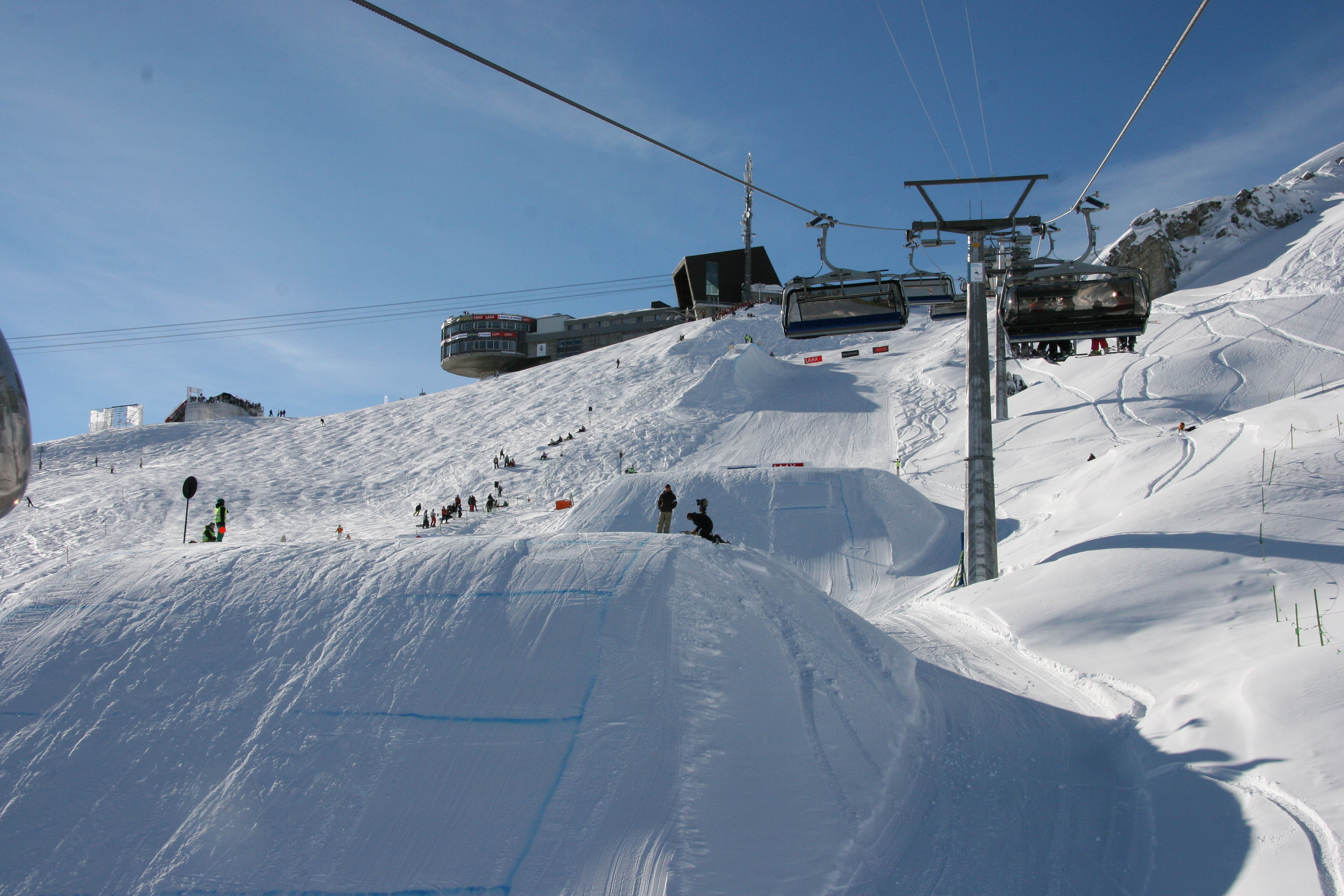 Boarders verso il cielo nella slopestyle del Burton European Open 2008